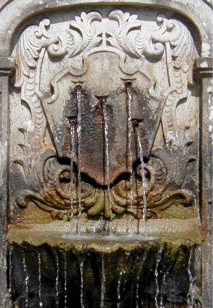 Fonte da Chagas nos escadórios do Bom Jesus em Braga, Portugal. Foto de Jose Goncalves